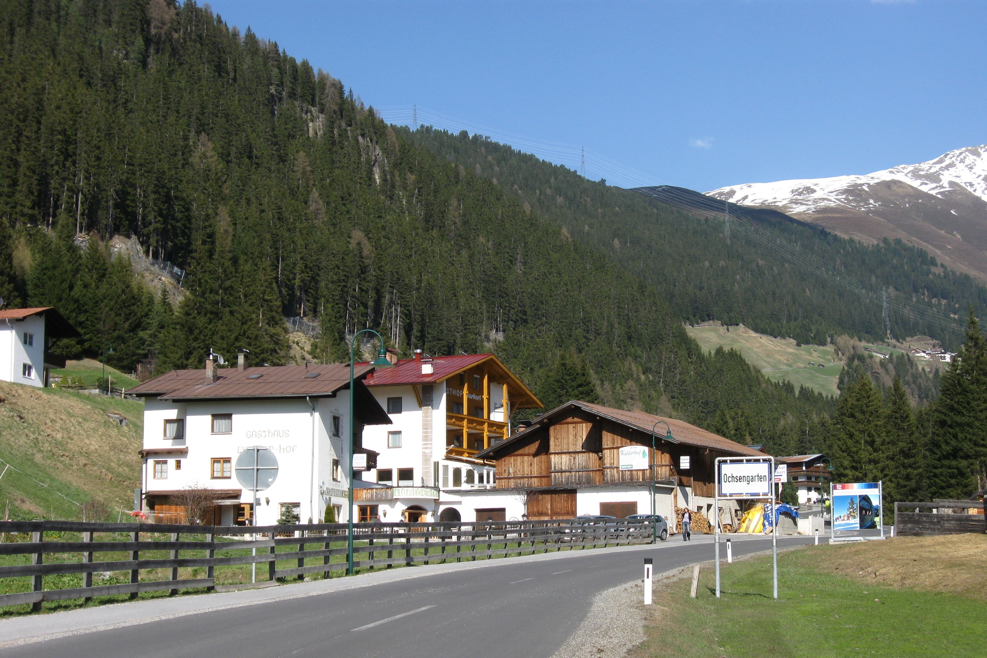 Der westliche Ortsrand des Haiminger Ortsteils Ochsengarten